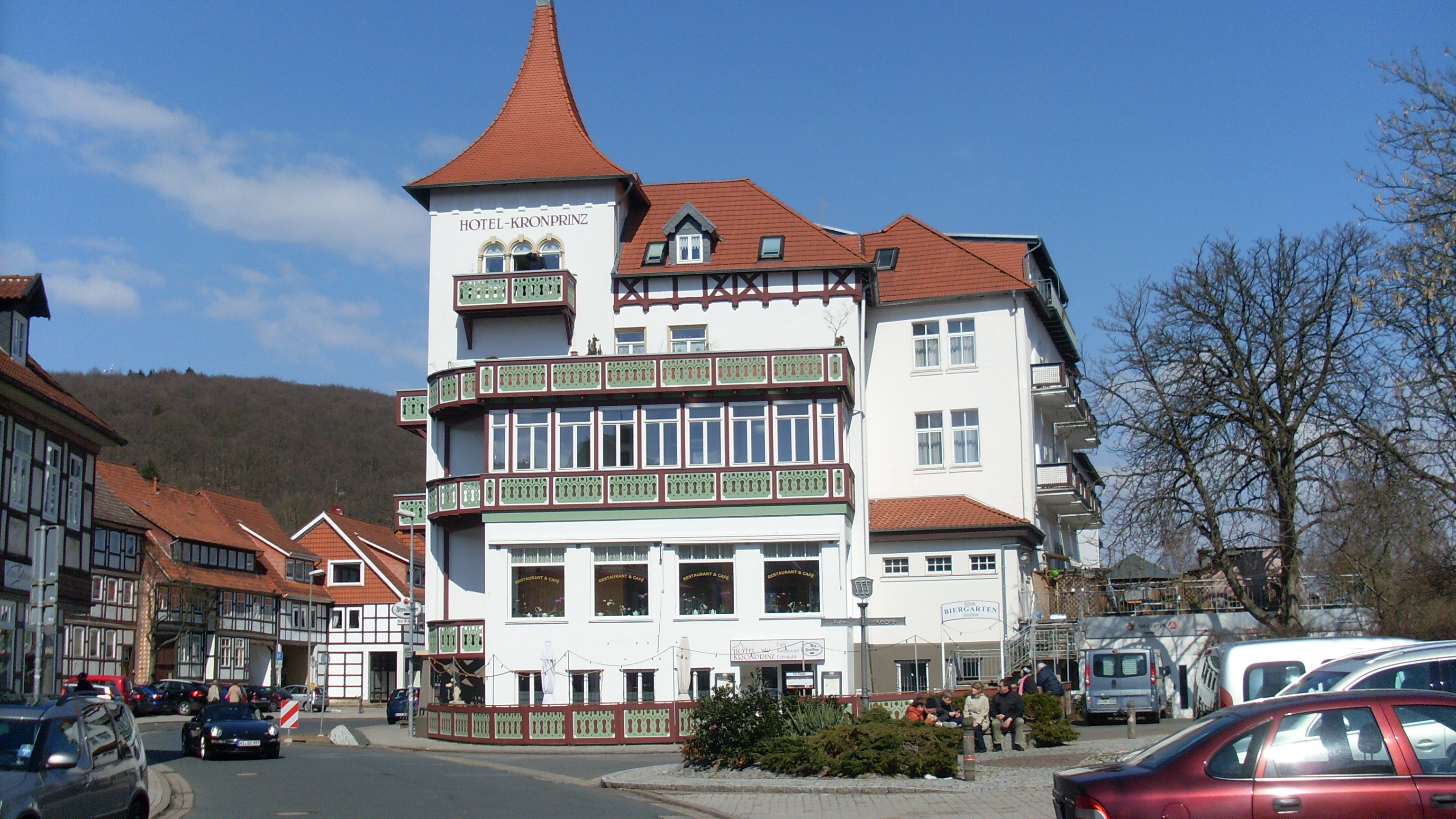 Hotel Kronprinz